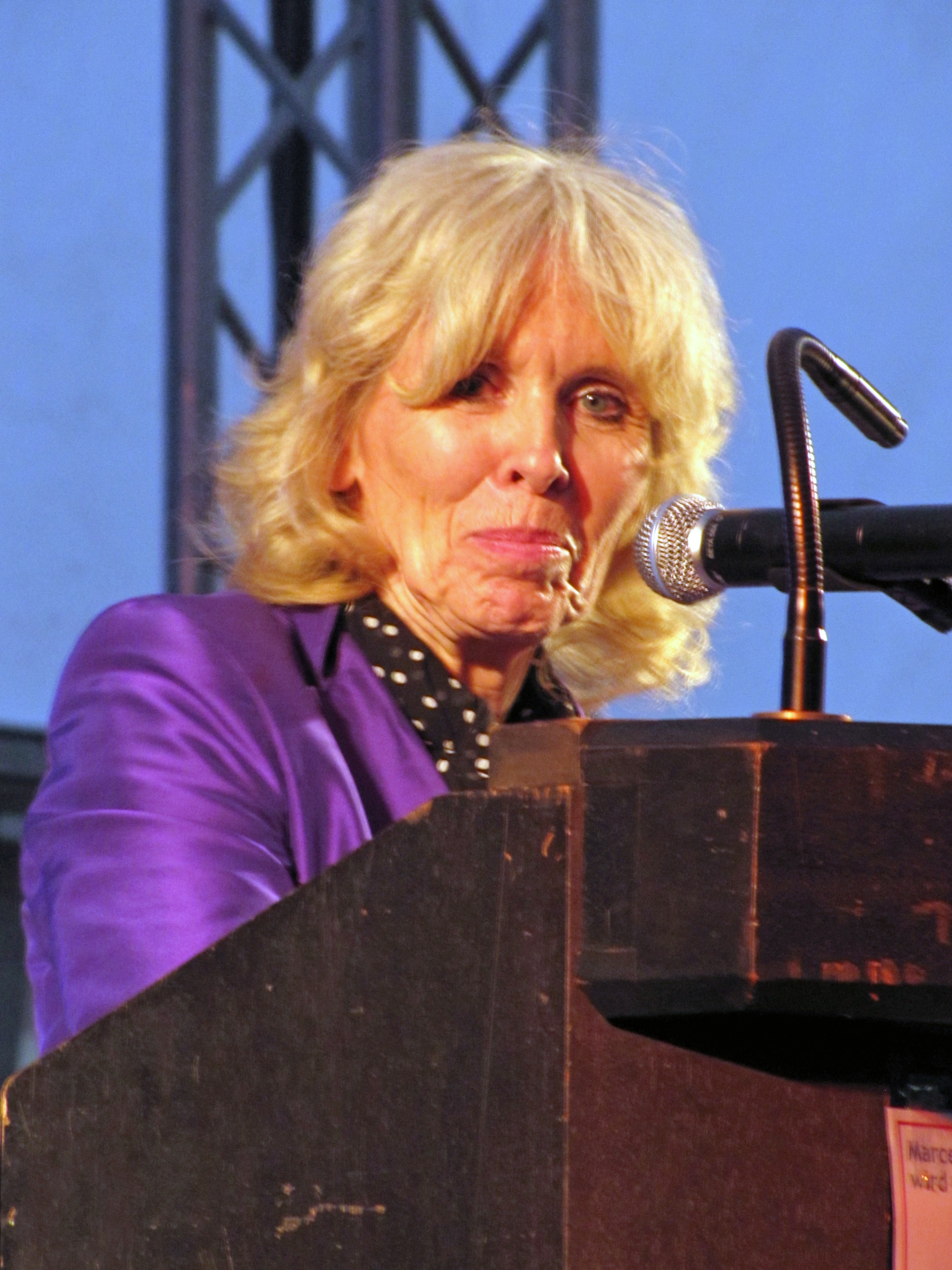 Berger Stadtschreiberfest 2012, Marianne Leuzinger-Bohleber bei ihrer Festrede in Bergen (Frankfurt am Main).